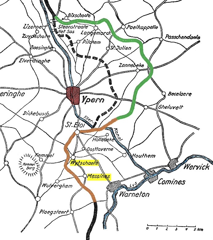 Ypernbogen, nachträglich koloriert